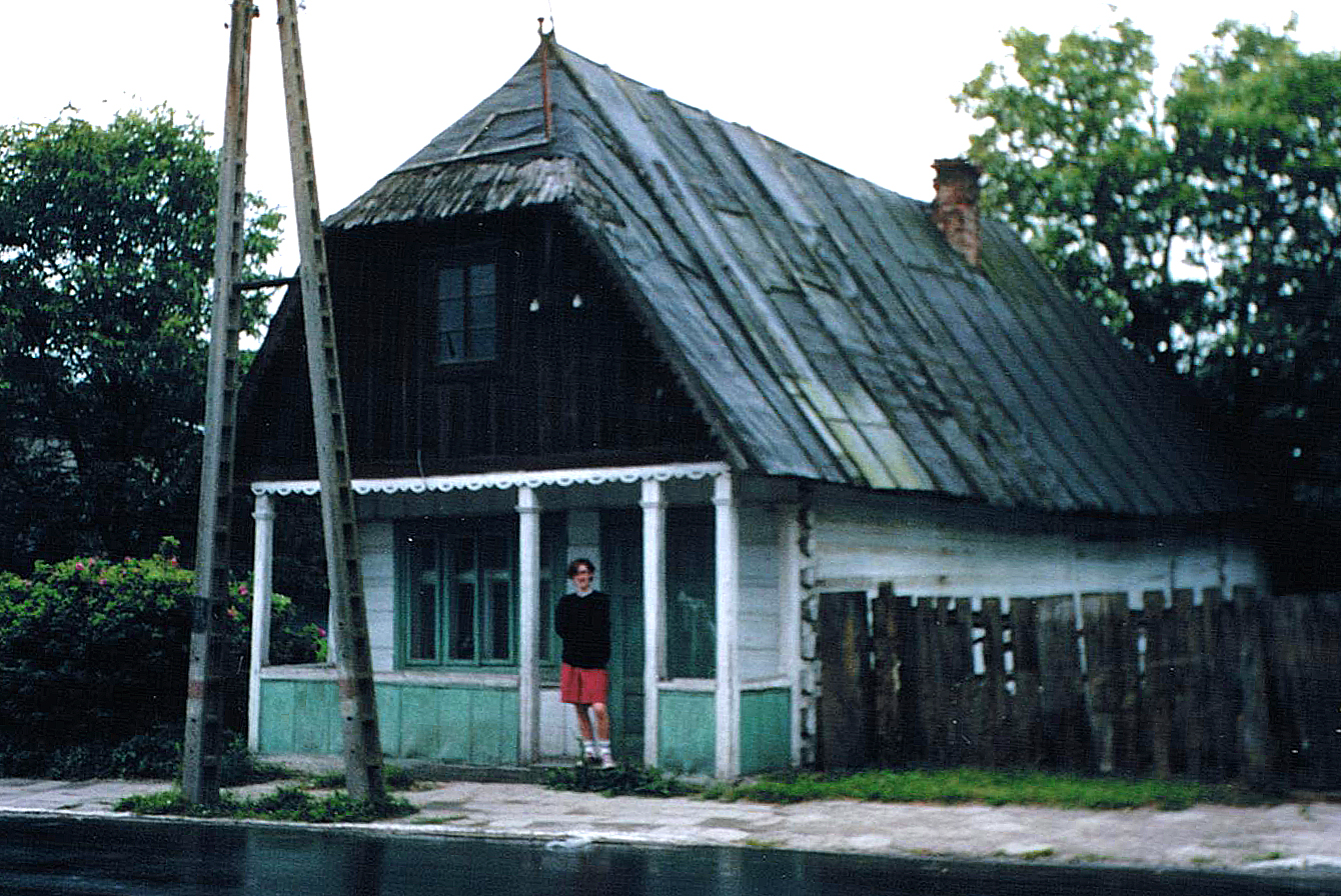 Tarnogród, Poland - Old Jewish house 19th century • Tarnogród, Polska - Pożydowski dom z XIX wieku